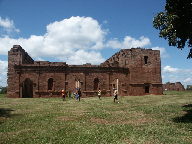 ヘスース・デ・タバランゲの建築途中で遺棄された教会（全体）